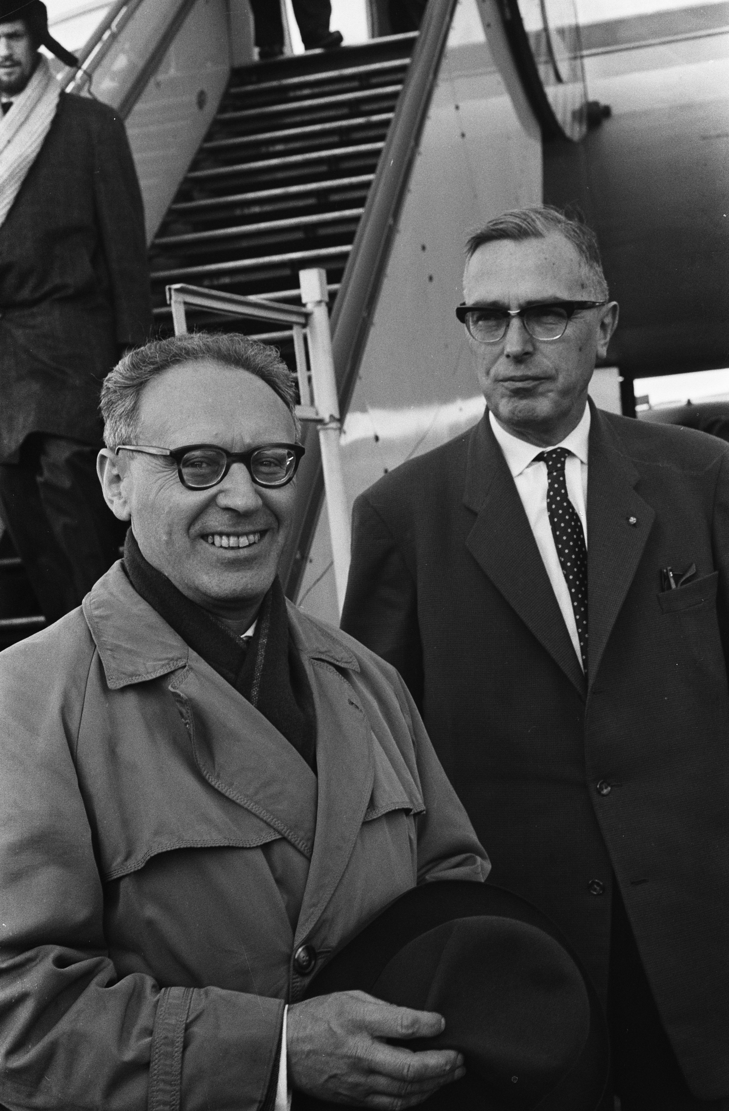 Collectie / Archief : Fotocollectie Anefo Reportage / Serie : [ onbekend ] Beschrijving : Botwinnik in Nederland om simultaan te spelen, op Schiphol afgehaald door Max Euwe Datum : 29 oktober 1962 Trefwoorden : aankomsten Persoonsnaam : Euwe, Max Fotograaf : Pot, Harry / Anefo Auteursrechthebbende : Nationaal Archief Materiaalsoort : Negatief (zwart/wit) Nummer archiefinventaris : bekijk toegang 2.24.01.05 Bestanddeelnummer : 914-4582